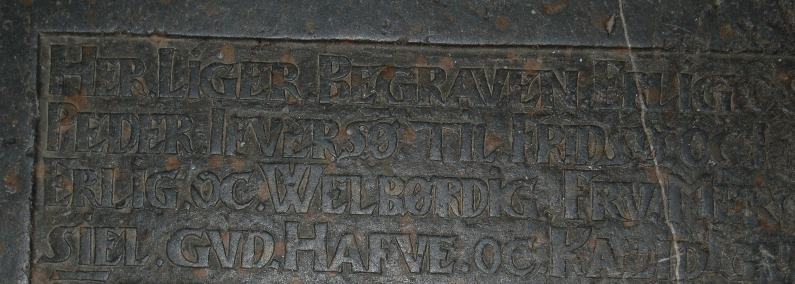 Navn på gravplata til Peder Iversøn i Hedrum kirke